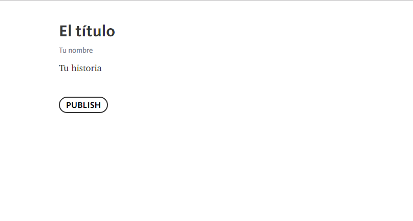 Captura de pantalla de la página web para publicación de texto Telegra.ph. Creado por Telegram Messenger.